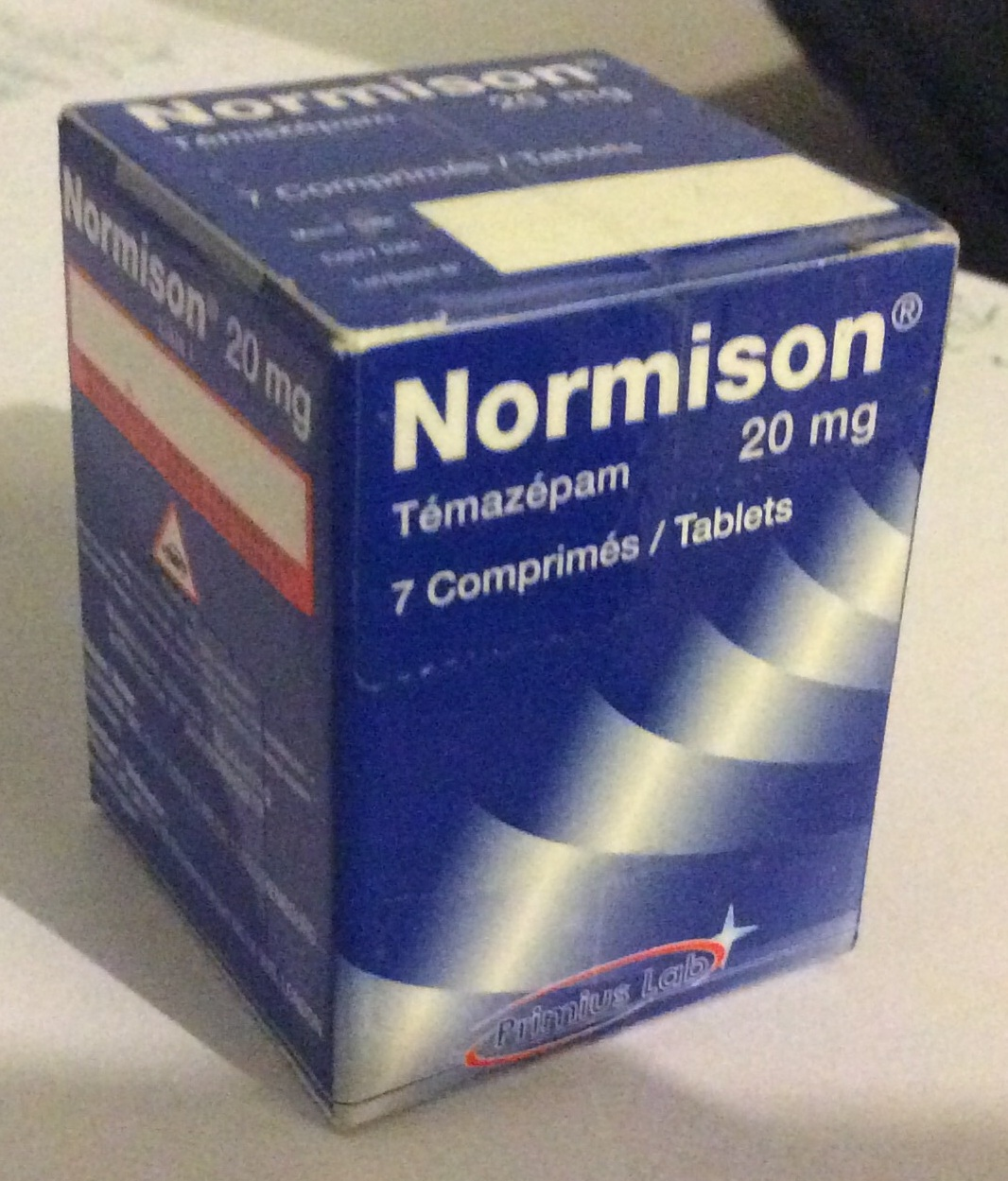 Boite de normison 20 de 7 cp